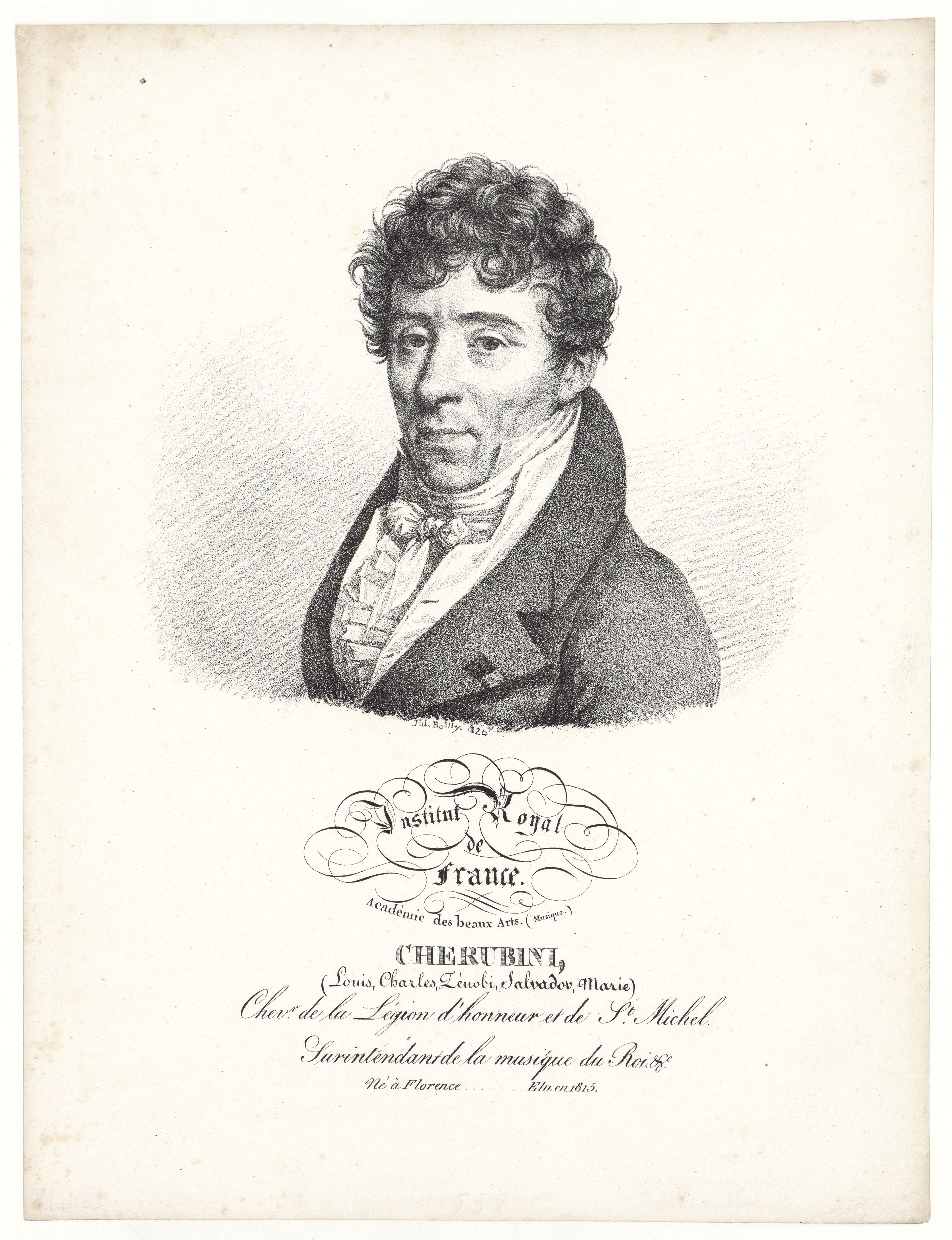 Luigi Cherubini (1760-1842) Institut Royal de France, Académie des Beaux Arts (musique)